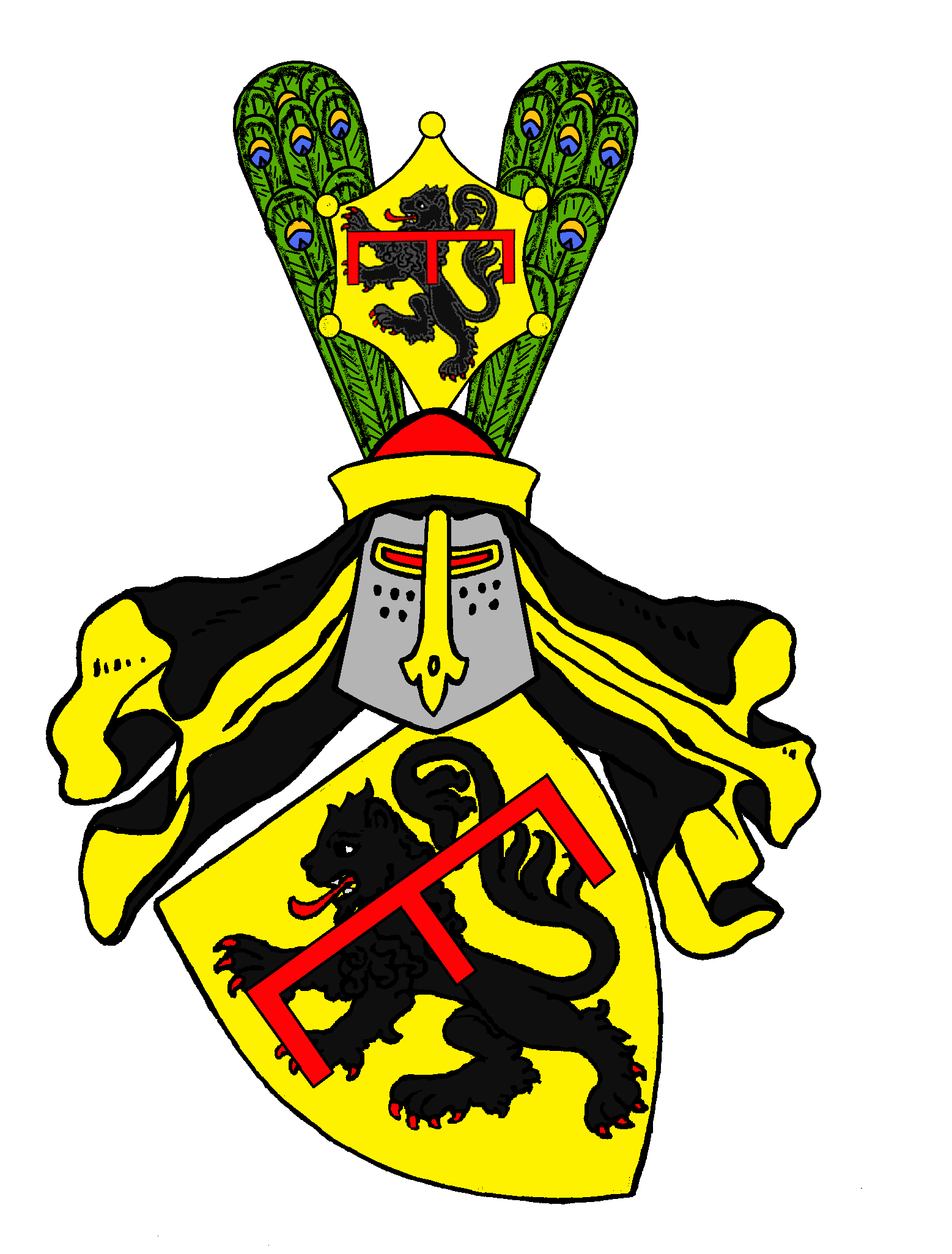 Stammwappen der Dynasten von Blankenheim